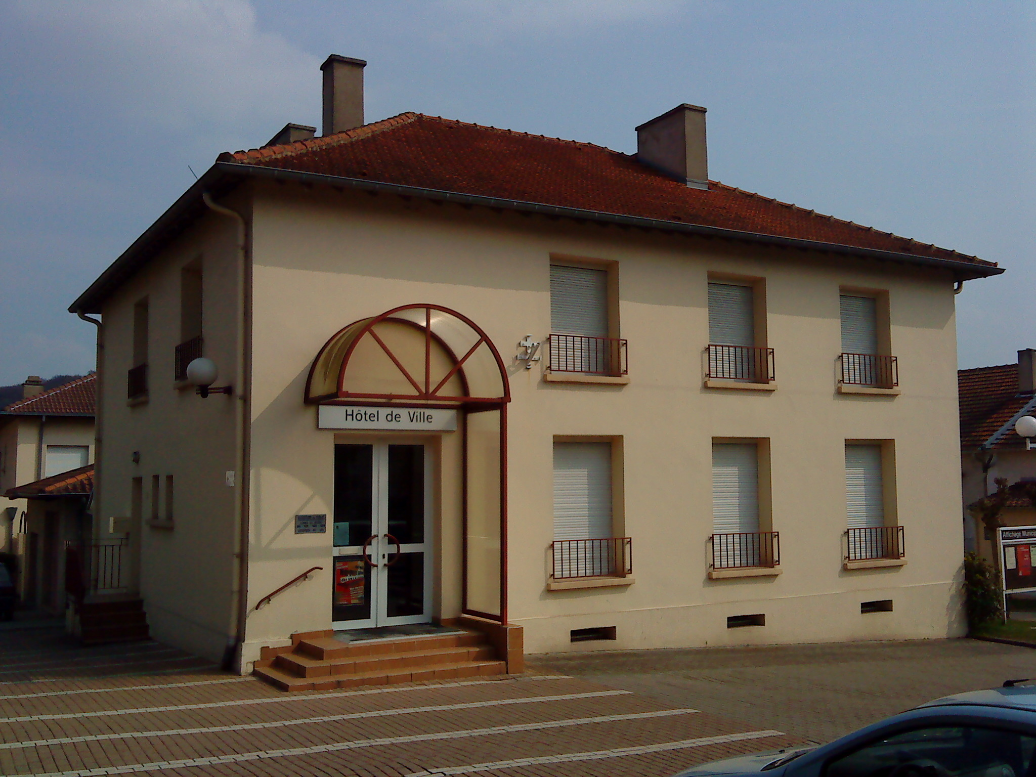 Hôtel de ville de la petite commune de Rosbruck. Il se situe au centre du village , a côté de l'église et de l'école.